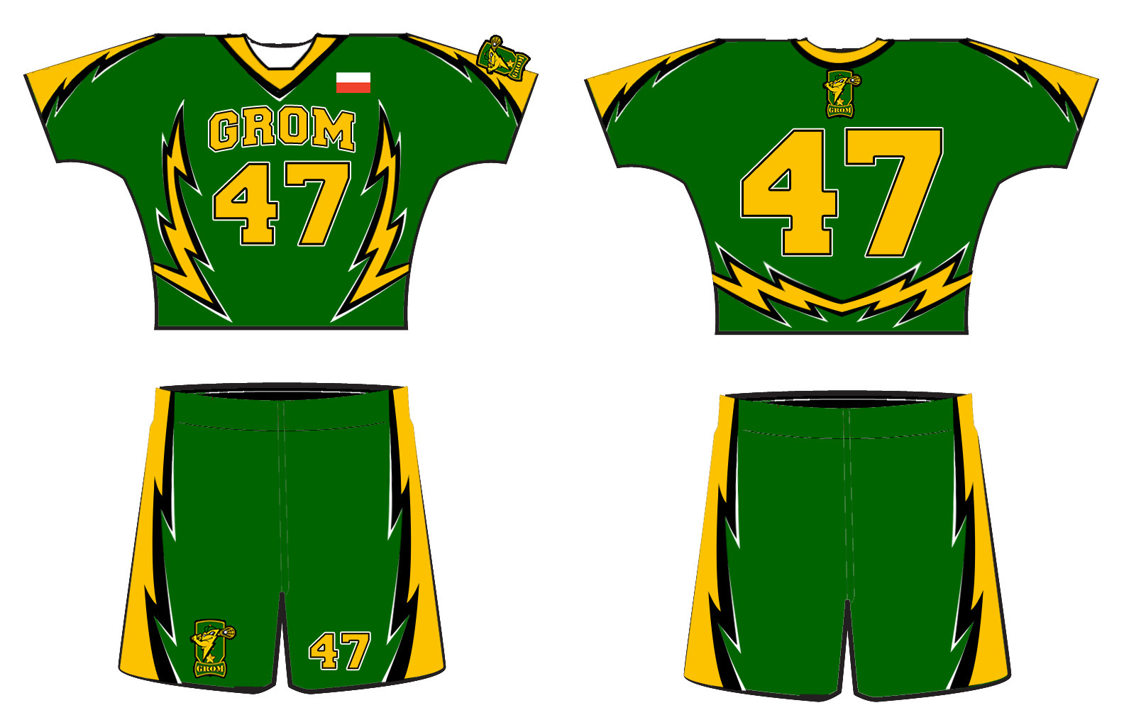 strój meczowy